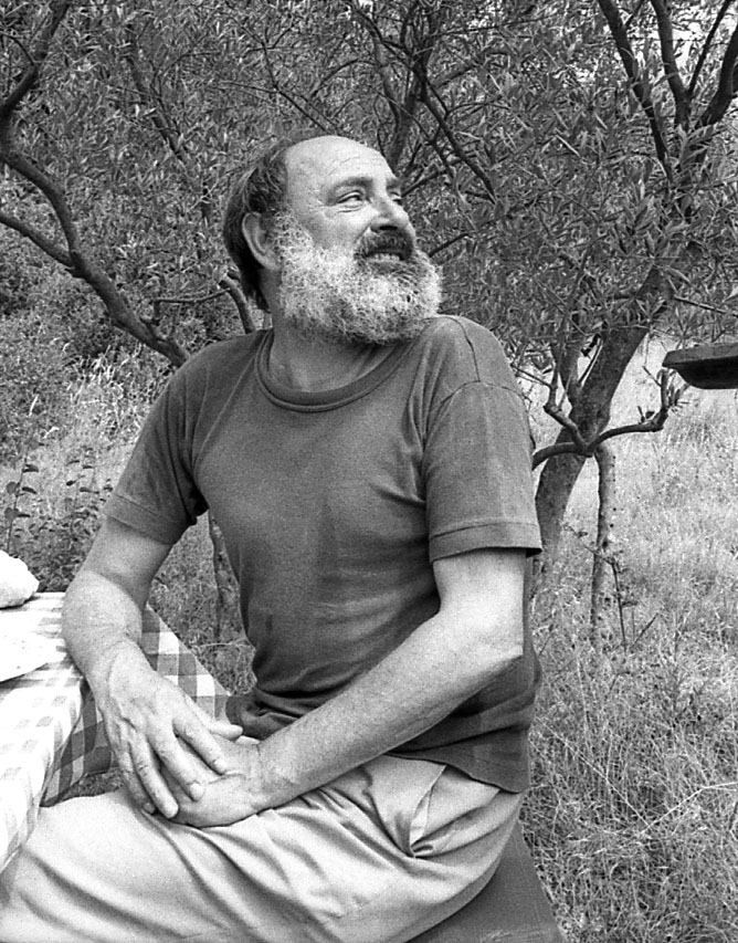 Portrait du peintre Georges ITEM,(photographie de Franck EHINGER)